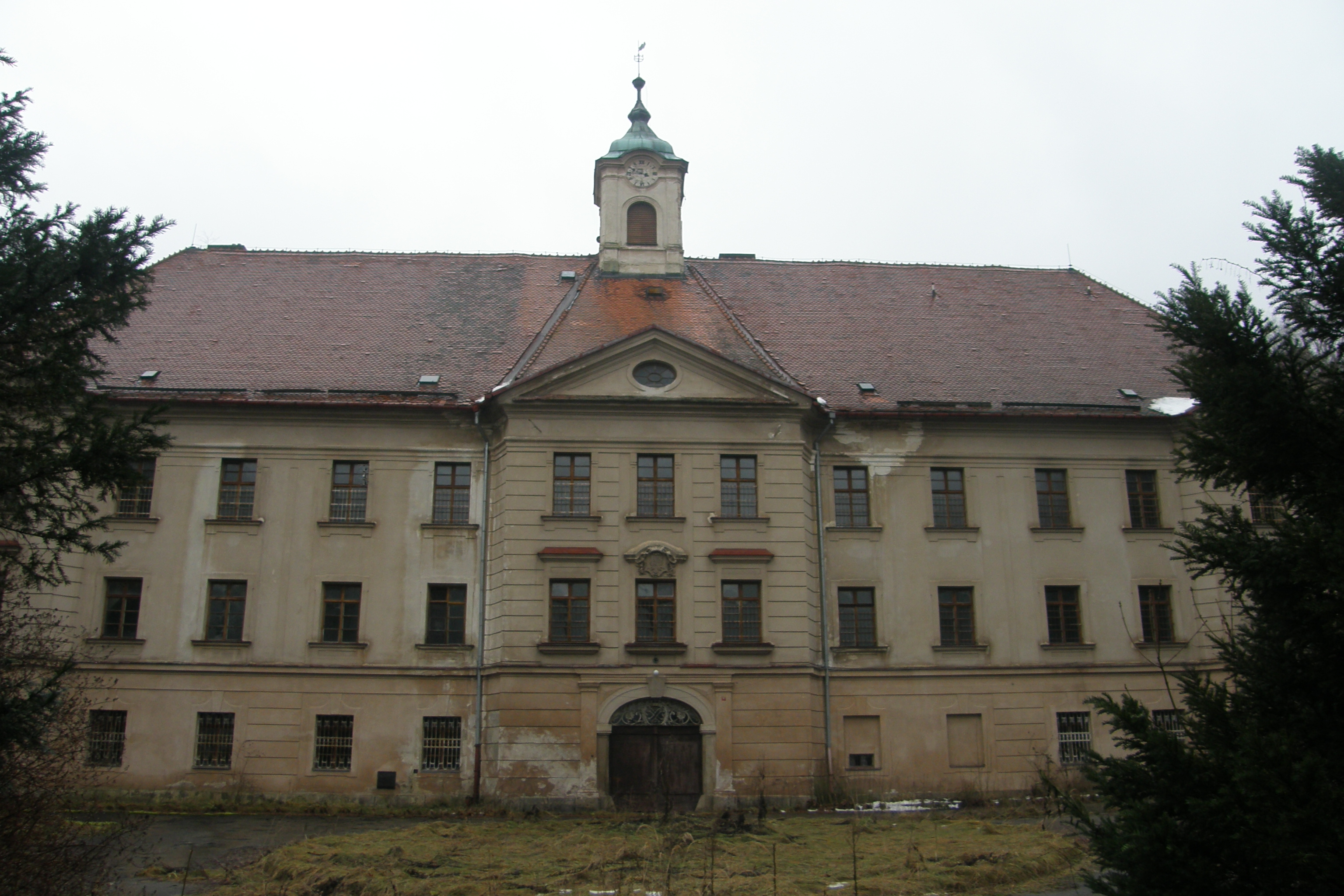 Zámek v Borotíně